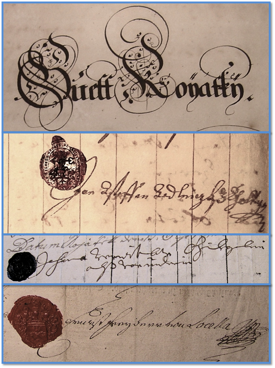 Faksimile podpisů majitelů panství Kojátky